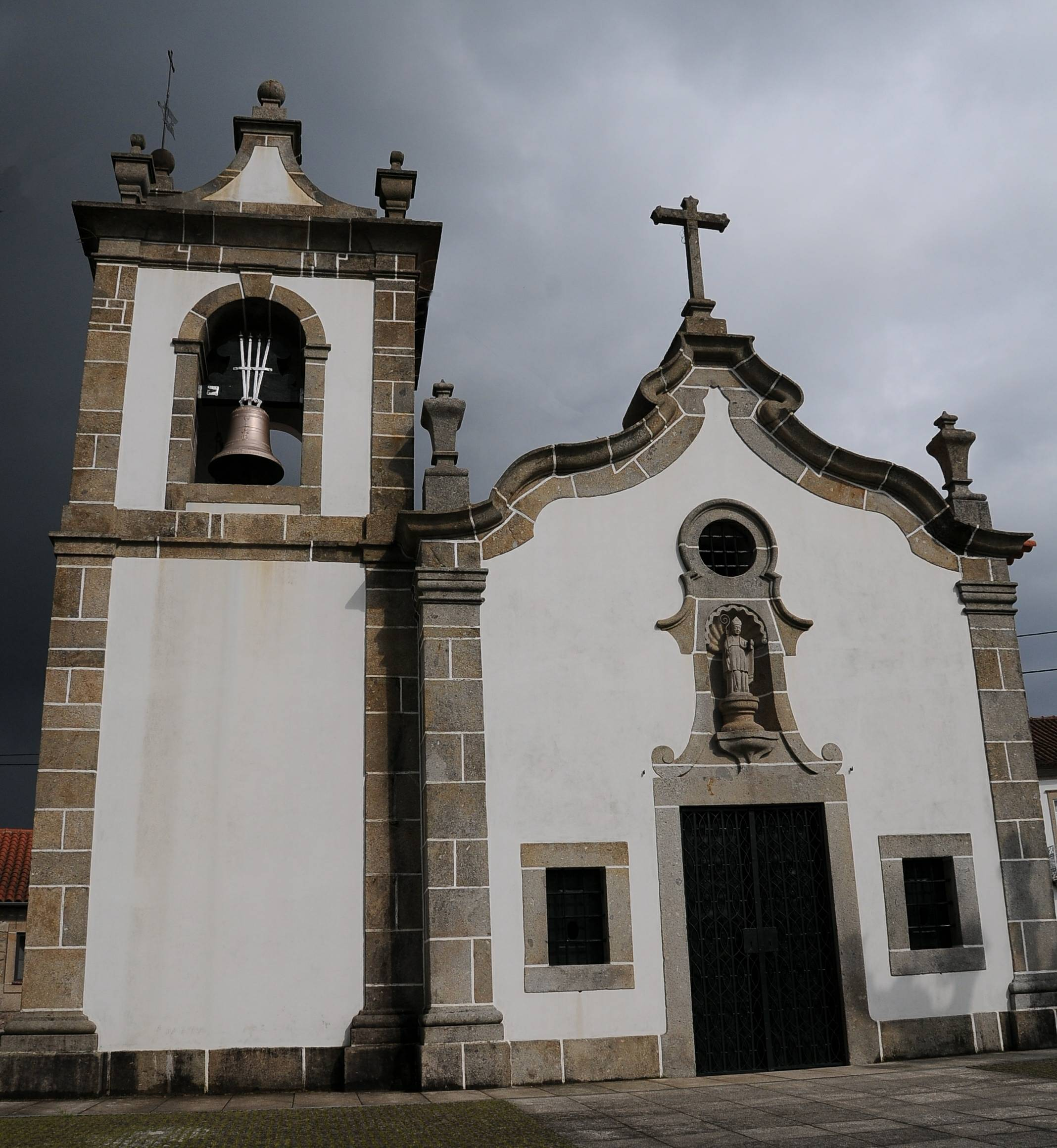 Saint Braz Chapel in Merelim, Braga, Portugal